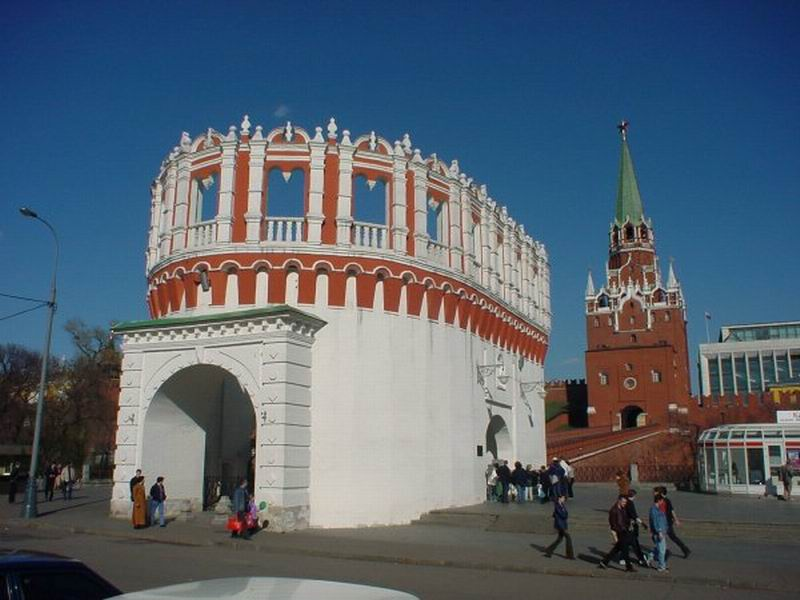 Kreml_Moskau, eigenes Foto von 2003, public domain. Mewes 19:02, 18. Mär 2005 (CET) Kutawja-Turm